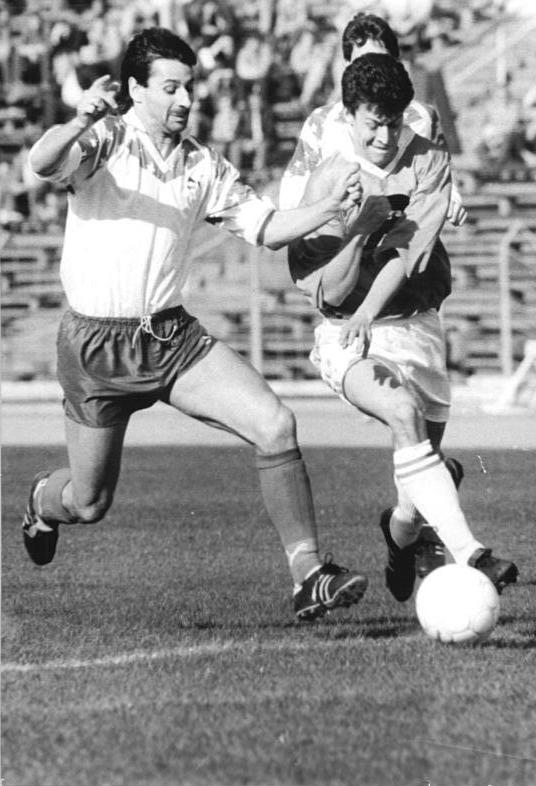 ADN-ZB-Oberst-17.3.90-wü-Berlin: Fußball-Oberliga FC Berlin -Energie Cottbus- Die ersatzgeschwächten Berliner (ohne Doll, Herzog, Backs, Reich) kamen über ein letztlich gerechtes 1:1-Unentschieden gegen die Cottbusser nicht hinaus. Jörg Burow (l., Cottbus) im Duell gegen den 1:0 - Schützen Eike Küttner (r).